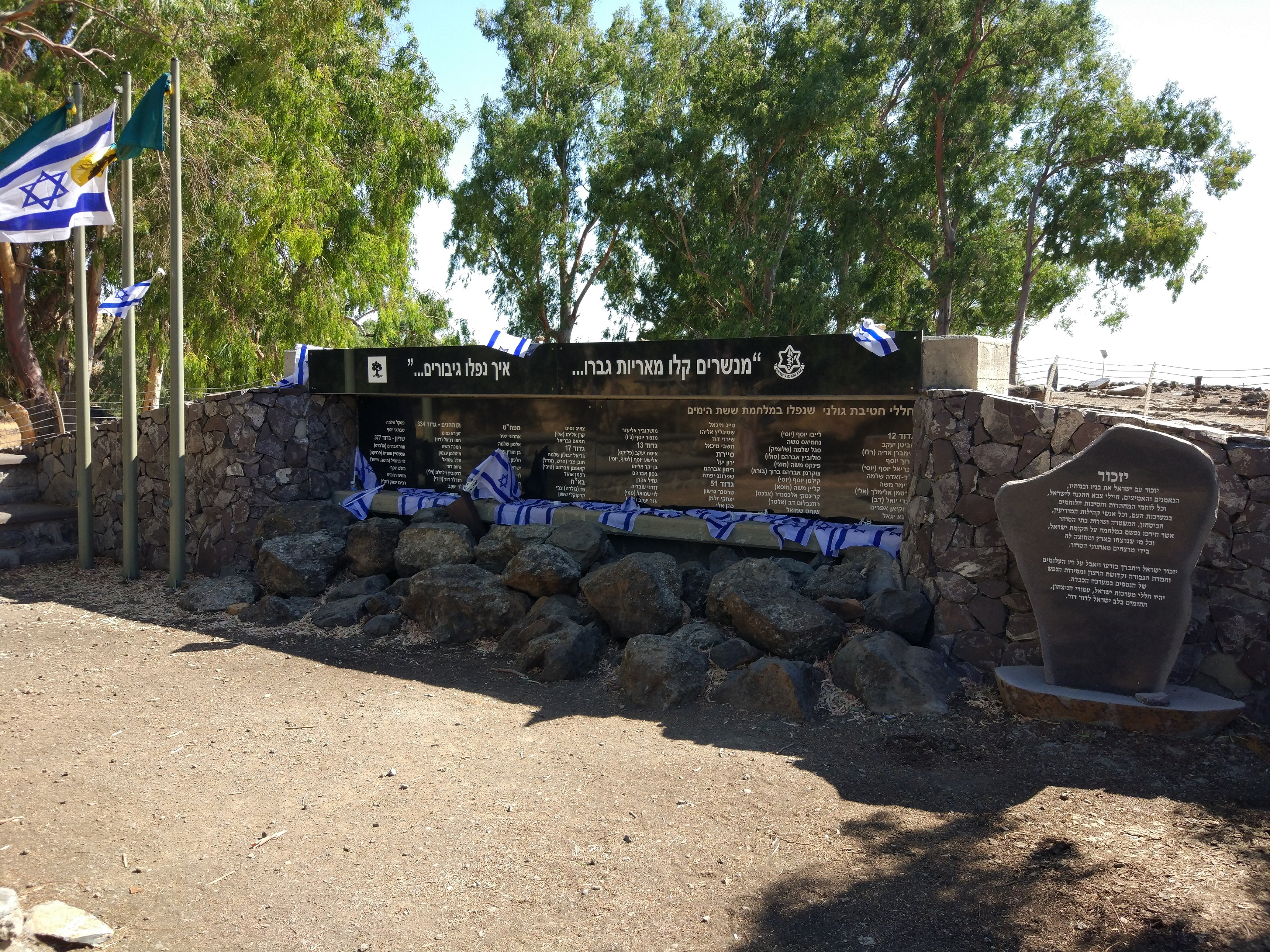 לוח הזיכרון המרכזי עליו חקוקים שמות הנופלים